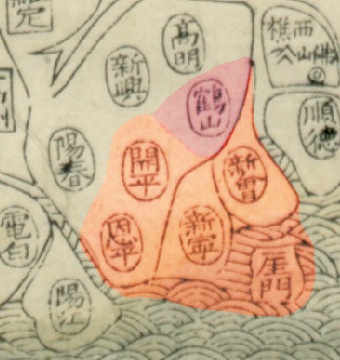 粵語: 四邑同五邑